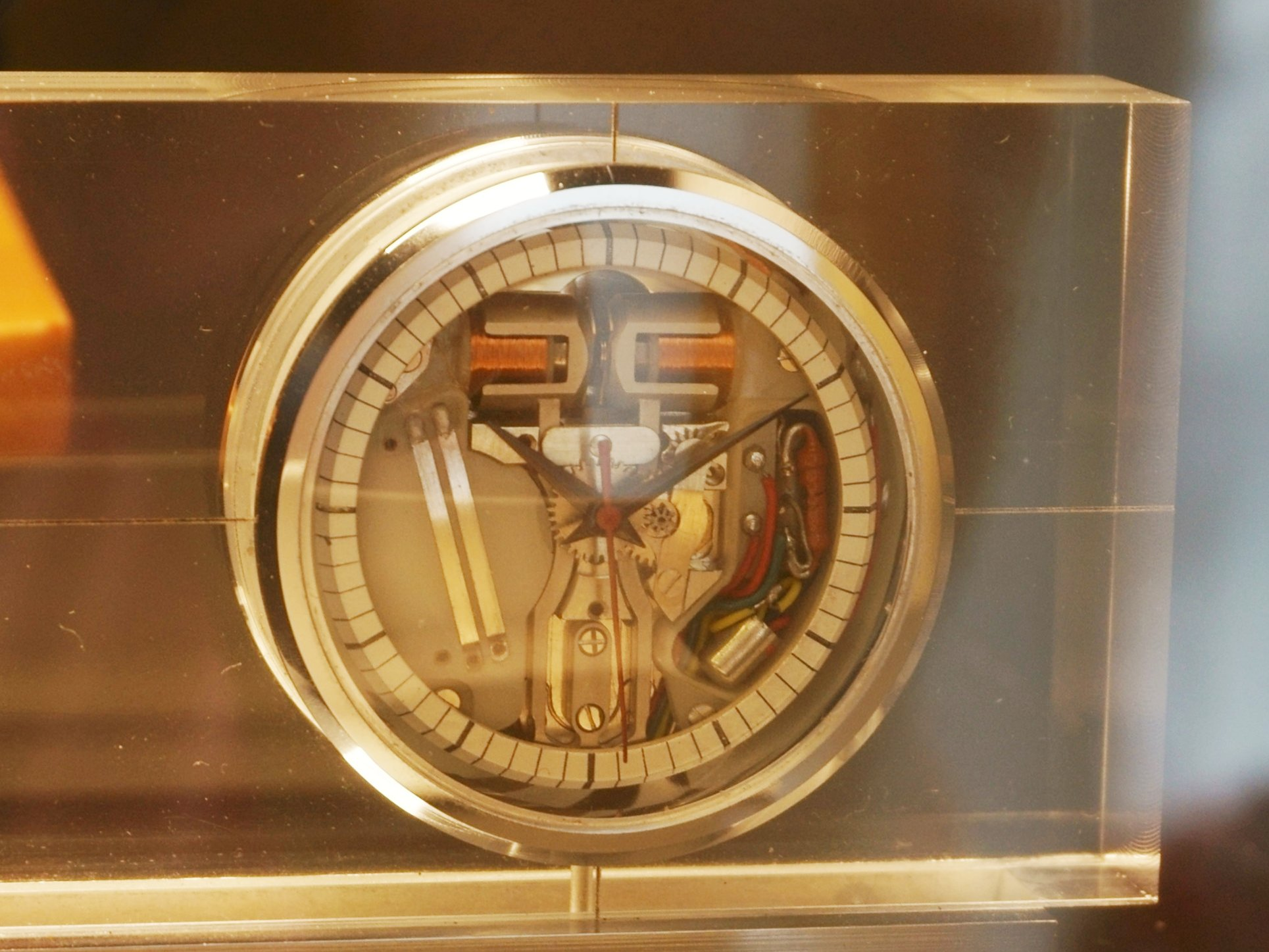 Nové město nad Metují, městské muzeum, expozice věnovaná hodinové značce Prim (do roku 1994), prototyp Accutron (podle systému firmy Bulova).